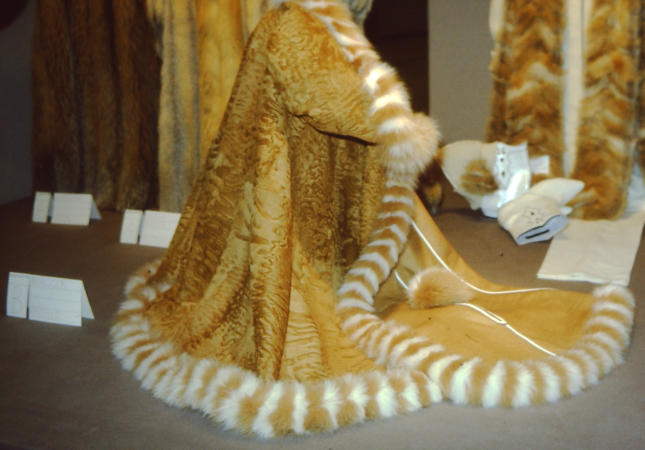 Leistungswettbewerb des Kürschnerhandwerks, Leistungsschau 1982, anlässlich der Pelzmesse in Frankfurt am Main. Reversibles Swakara-Persianercape mit Fuchsverbrämung. Firma Bisegger, Krefeld.